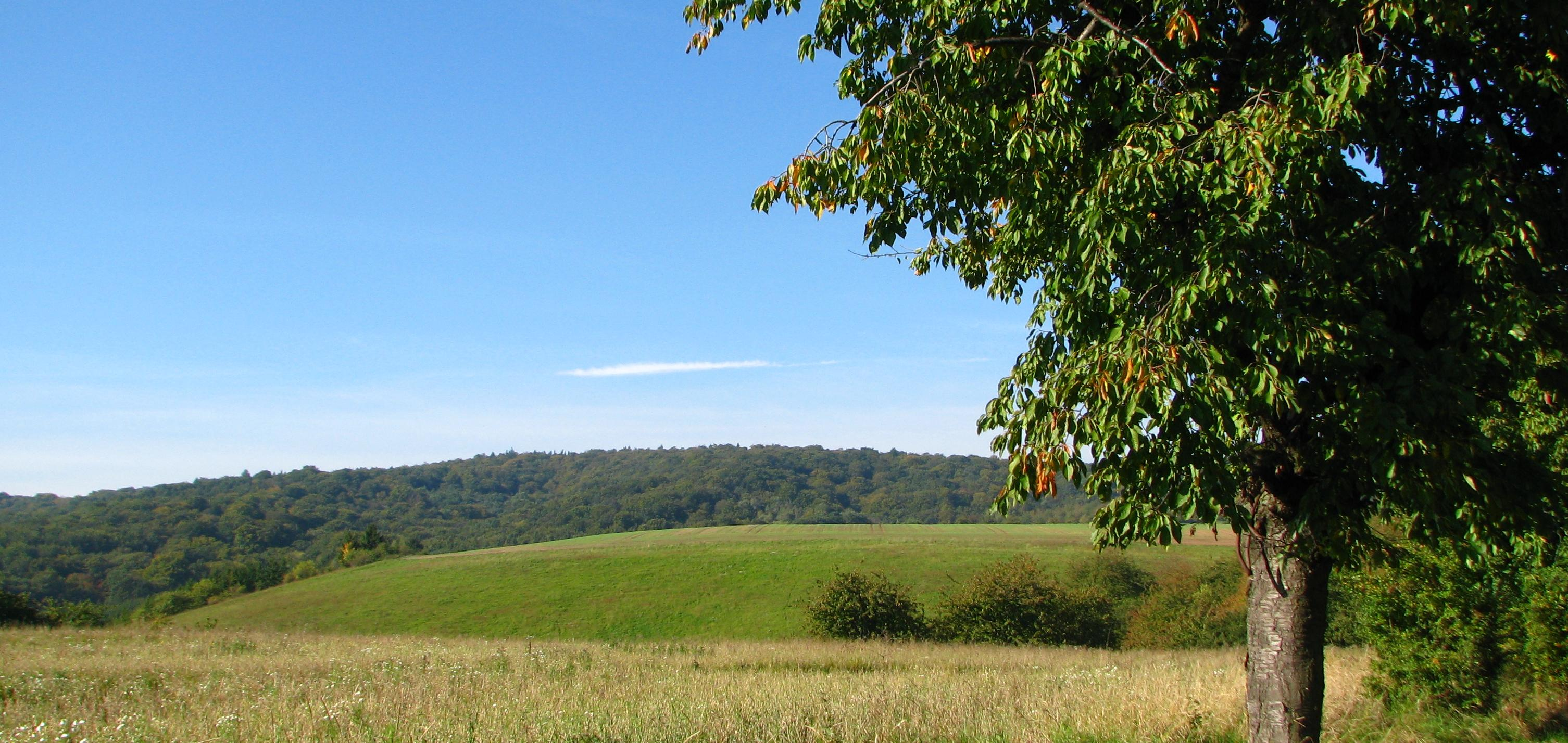 Blick vom Schlachtberg zum Schulzenberg (Hohe Schrecke).